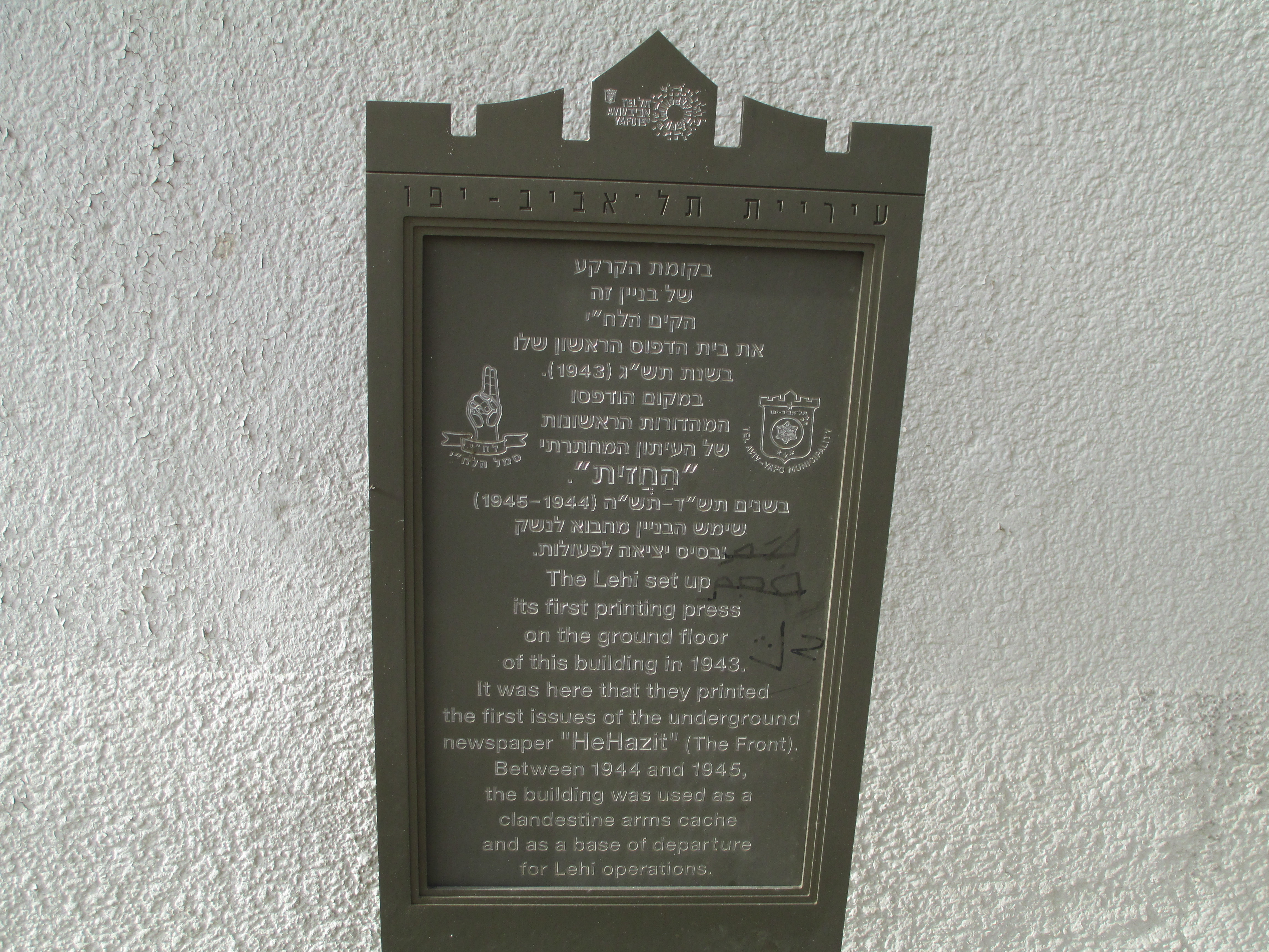 לוחית זיכרון על הבית בו הודפסו גליונות "החזית" של לח"י ברח' גאולה 4 בתל אביב